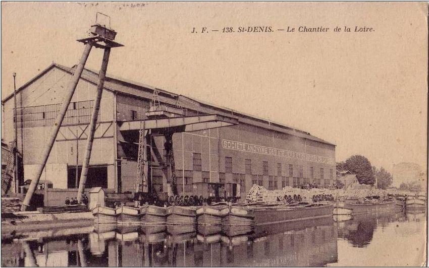 Canal Saint-Denis, chantier de la Loire